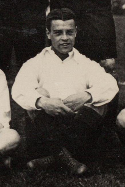 Nederlands elftal voor de interland tegen België.